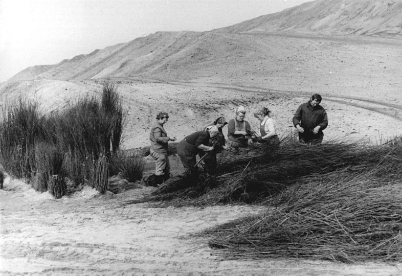 Spreetal, Tagebau, Rekultivierung ADN-ZB Weisflog 24.4.87 Bez. Cottbus: Rekultivierung- Zum Pflanzen werden diese Sträucher vorbereitet, die die Steilböschung an der Hochkippe des ehemaligen Tagebaus Spreetal befestigen sollen. Die Frauen der Pflanzbrigade vom VEB Meliorationsbau Cottbus pflanzen vor allem Weiden, Robinien und wilde Rosensträucher. Es müssen sieben Hektar Böschung bepflanzt werden.